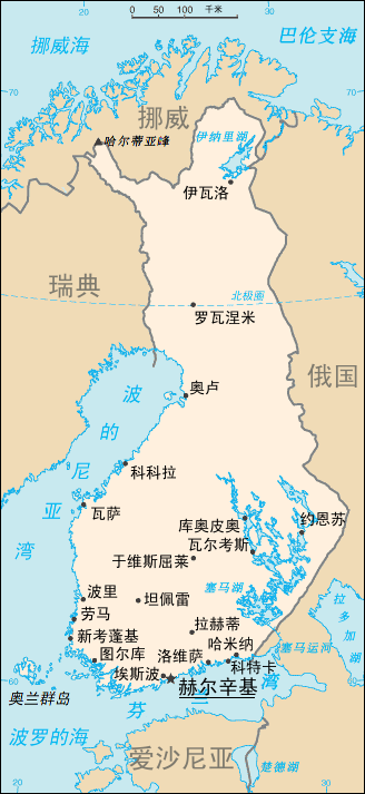 芬兰地图。